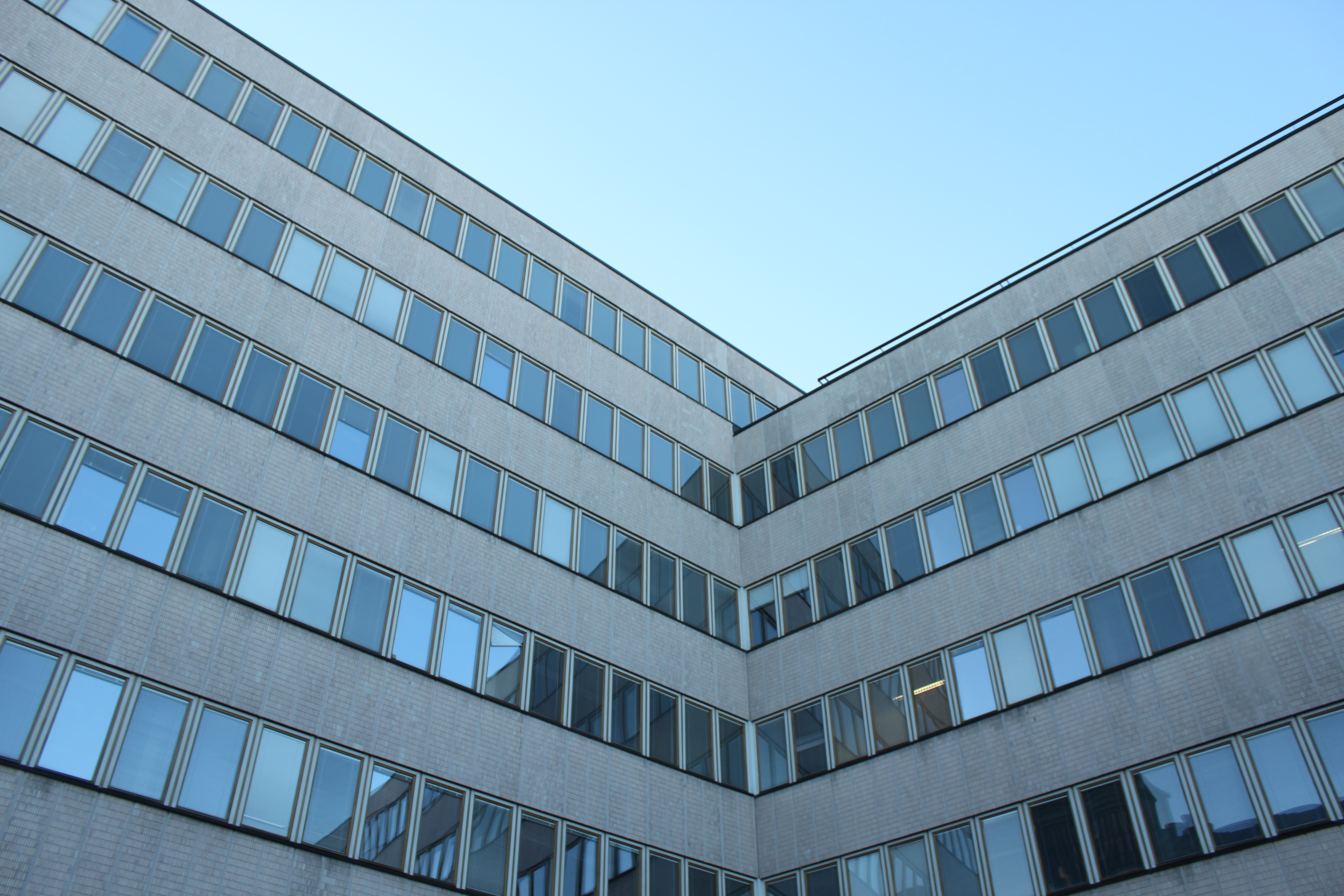 Porthania-rakennus Helsingin yliopiston keskustakampuksella. This is a photo of a monument in Finland identified by the ID 'City Centre Campus' (Q4348801) - RKY: 4633 This is a photo of a monument in Finland identified by the ID 'buildings of the University of Helsinki' (Q30506309) - RKY: 4633